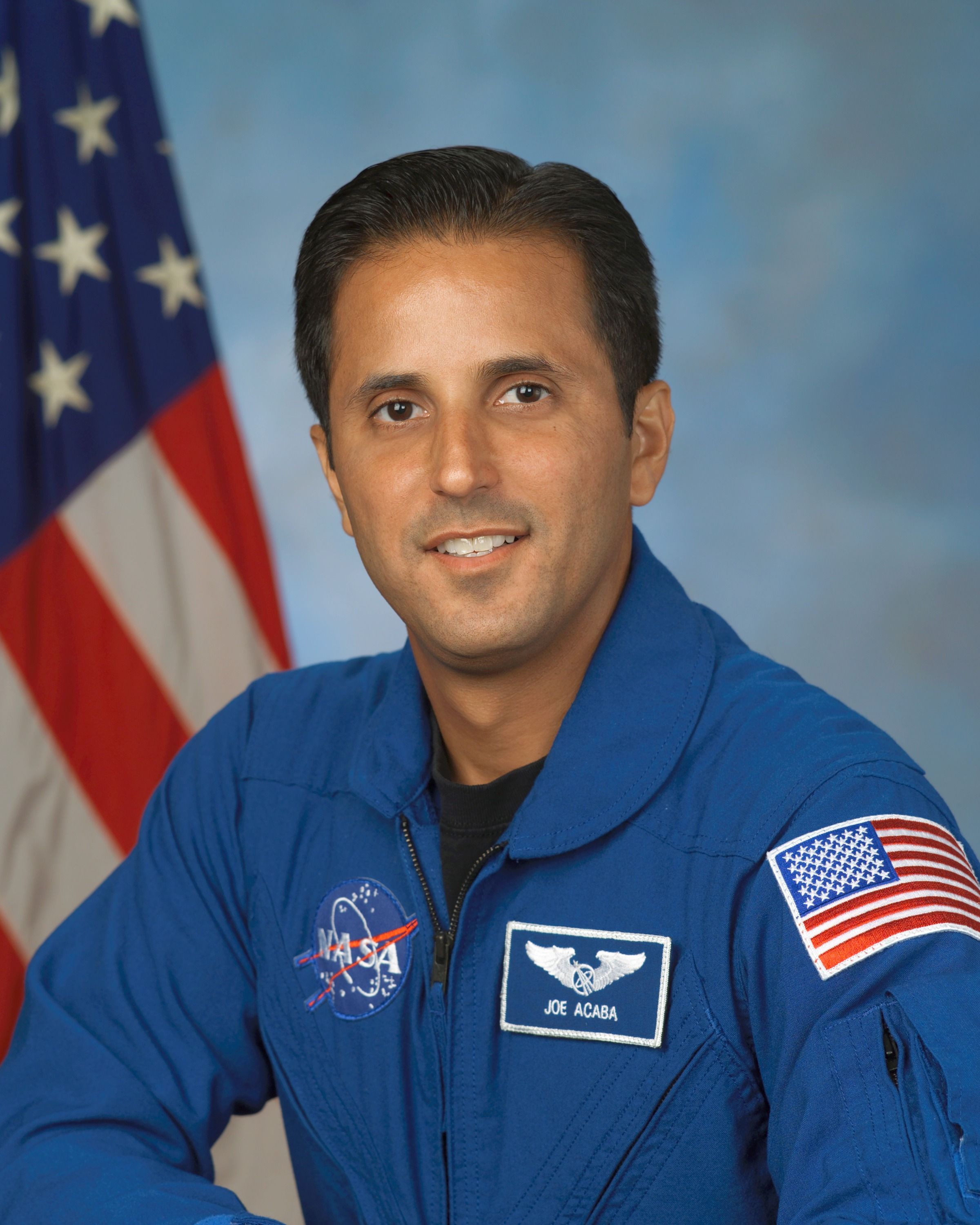 Puerto Rican astronaut portrait joseph acaba